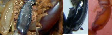 Odlišení čeledi Buthidae